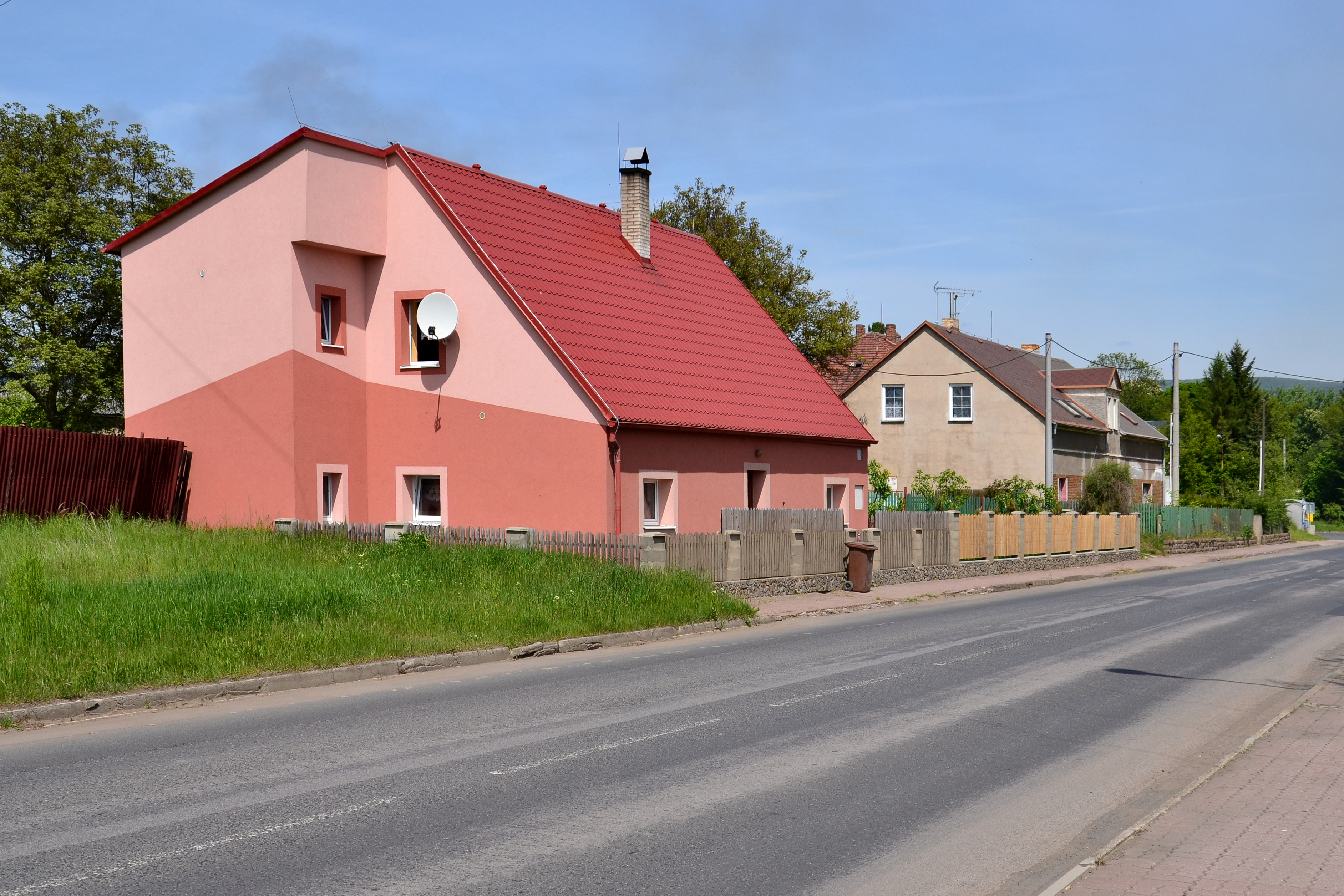 Prunéřovské domy na okraji Kadaně